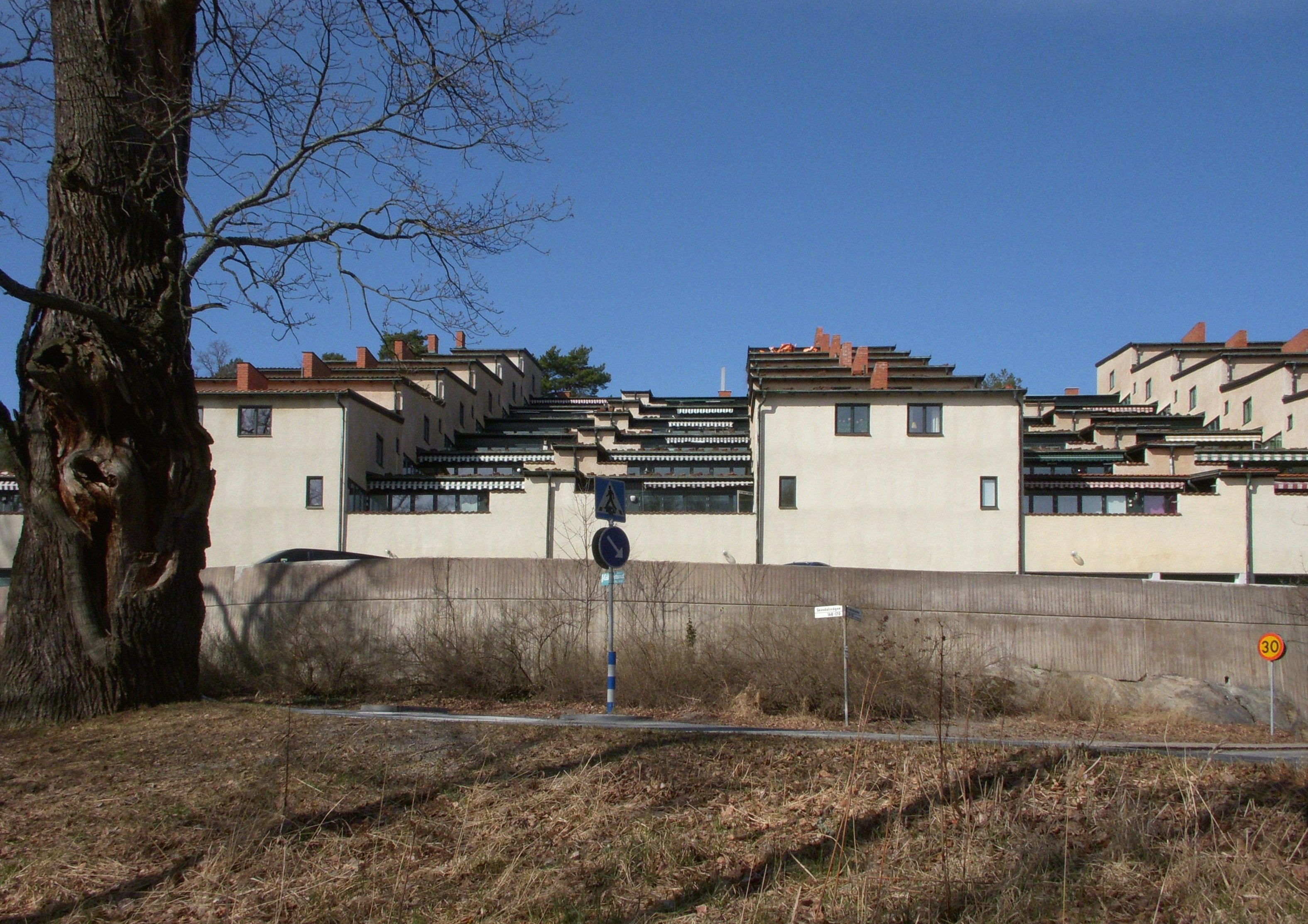 Terrasshusbebyggelse vid Dalbobranten